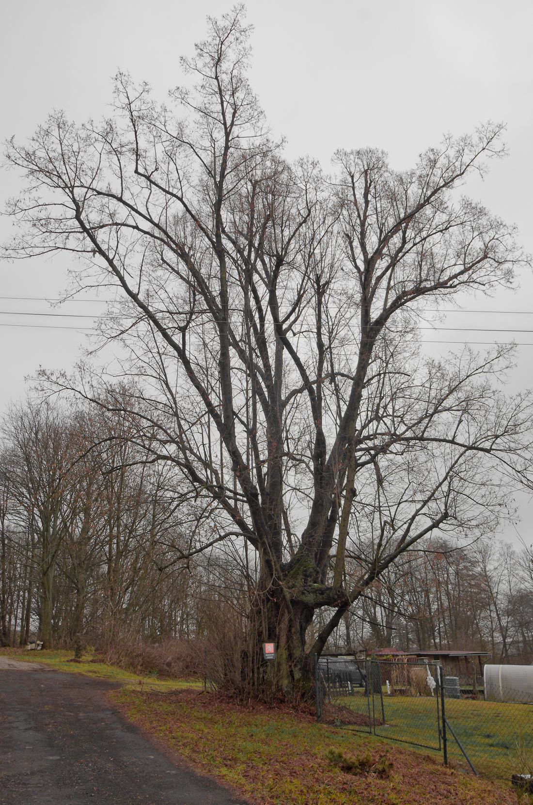 Dolní Nivy, okres Sokolov, Jirákova lípa, památný strom v obci u čp. 7, nízký, dutý a silně zmlazující kmen, sekundární koruna, výška 22,5 m, obvod kmene 719 cm, stáří 500 let (údaje z roku 2003)